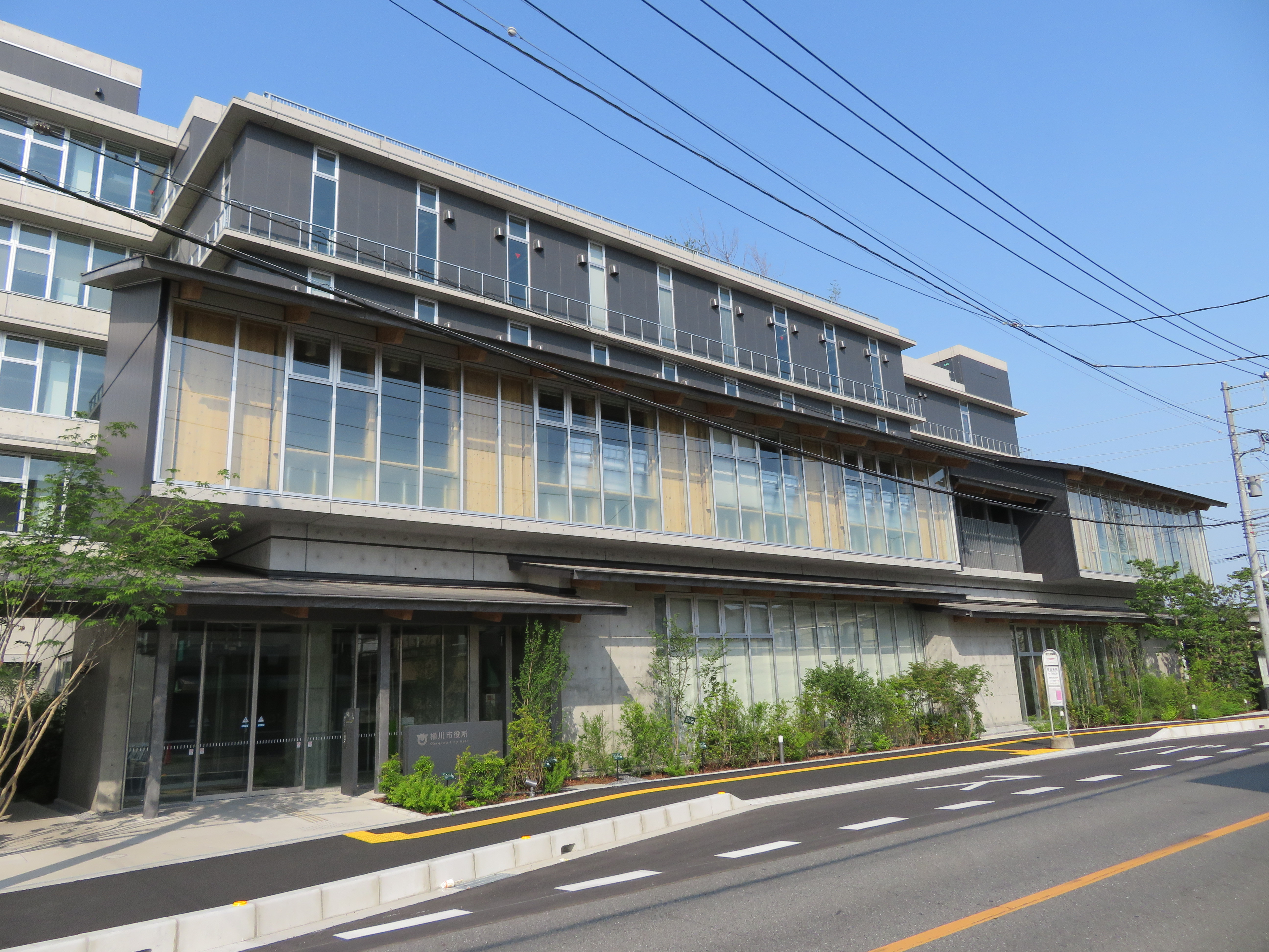 桶川市役所庁舎（2018年5月7日から使用開始した新庁舎） Canon PowerShot SX720 HS